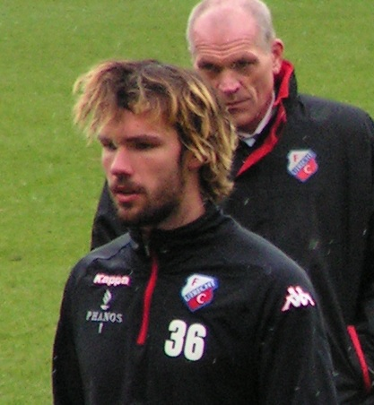 Canadees voetballer Jacob Lensky tijdens een training bij FC Utrecht.